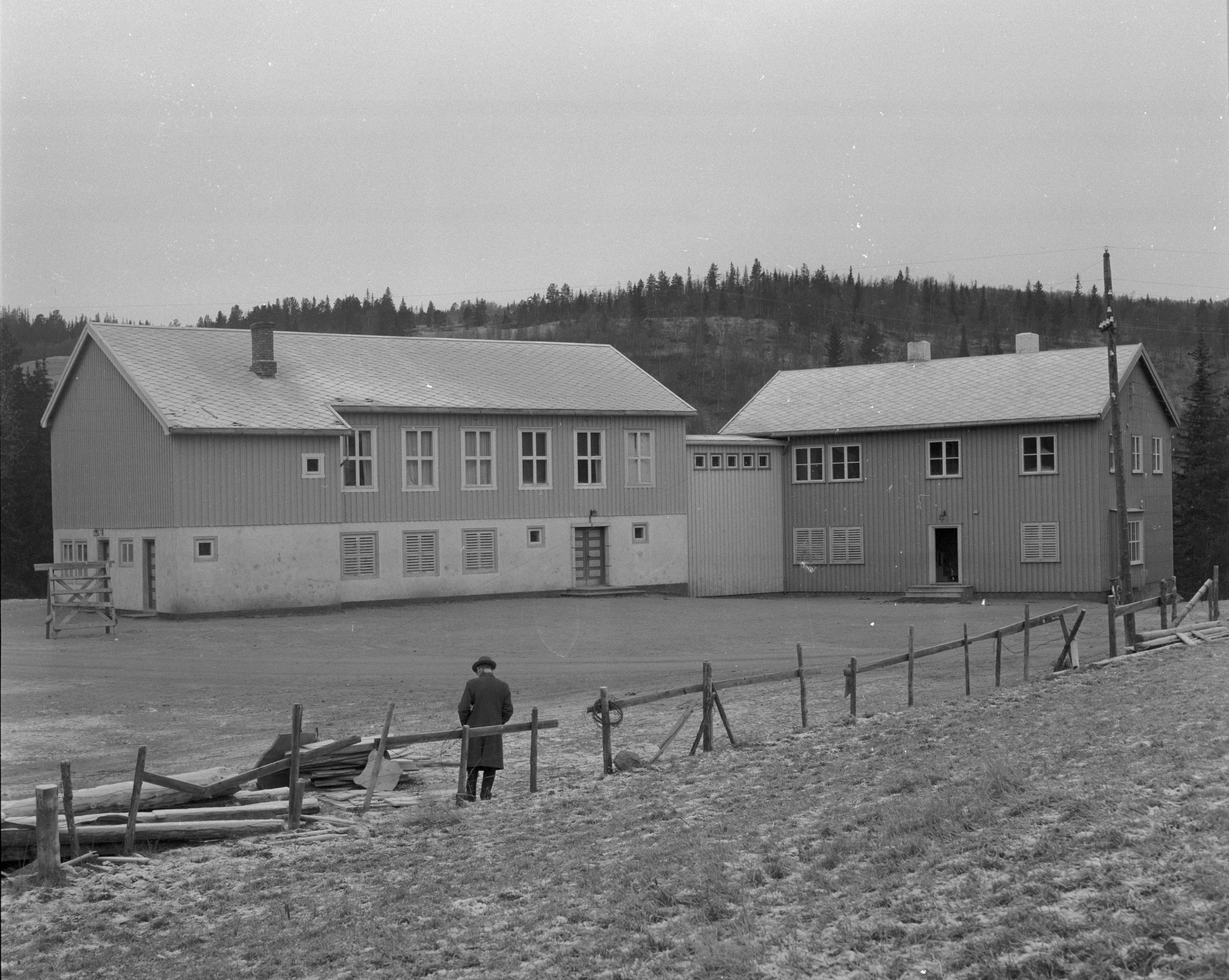 Fra Budal. Foto: Klaus Forbregd/NTNU UB (1961). ID: FB-61-092-A1-01_01.